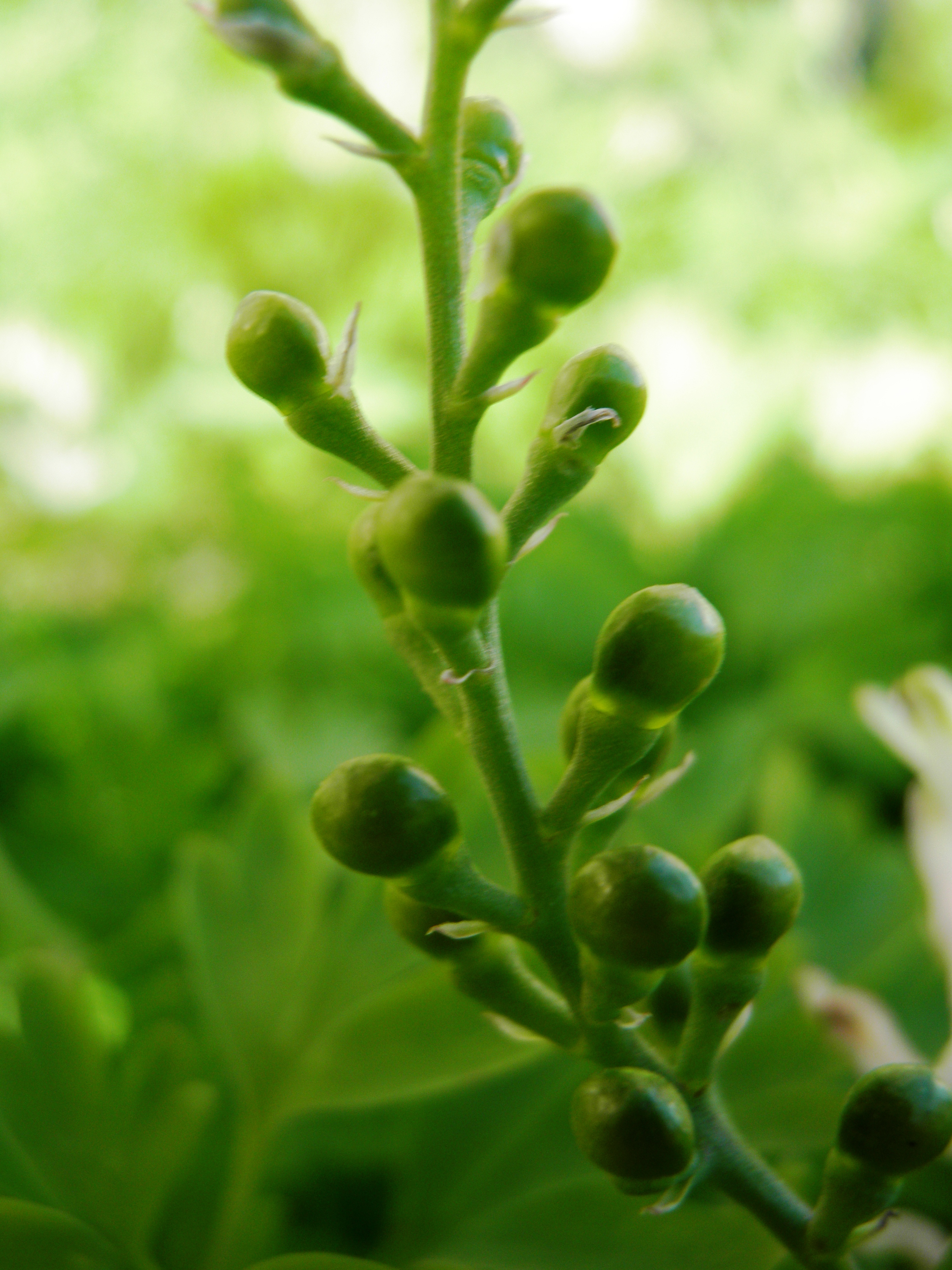 flowers Judean Fumitory עשנן יהודה - פרי